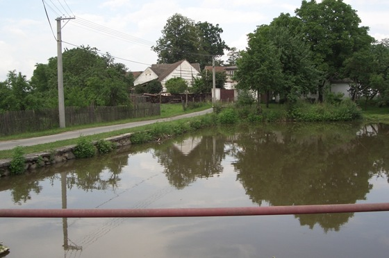 Fotografie návsi v Nové Vsi u Dírné.